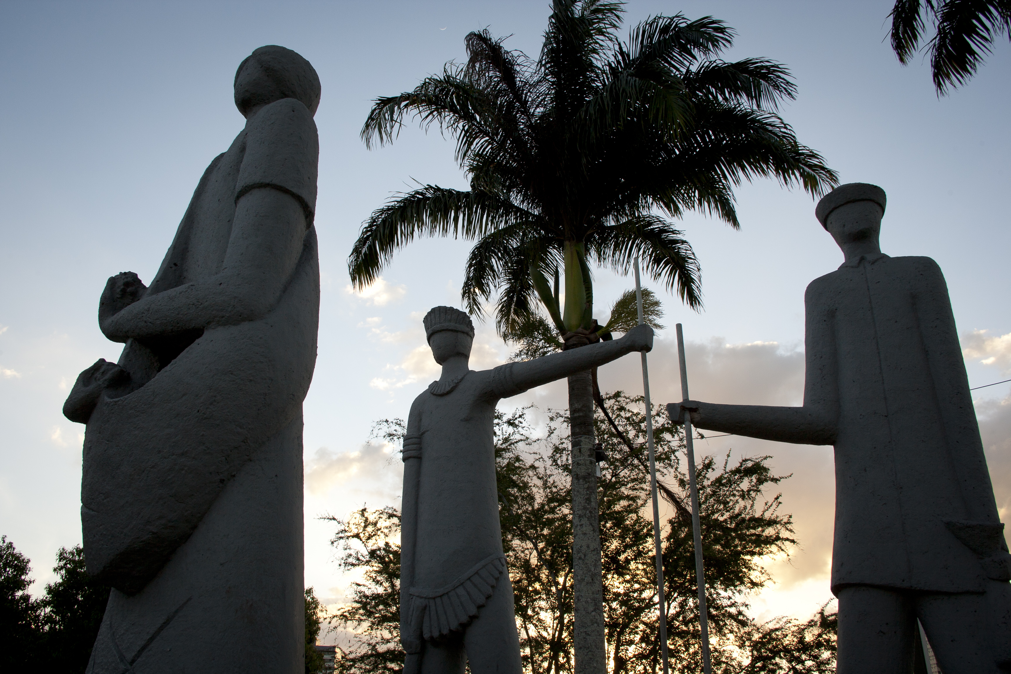 Os Pioneiros da Borborema - Campina Grande - Paraíba - Brasil